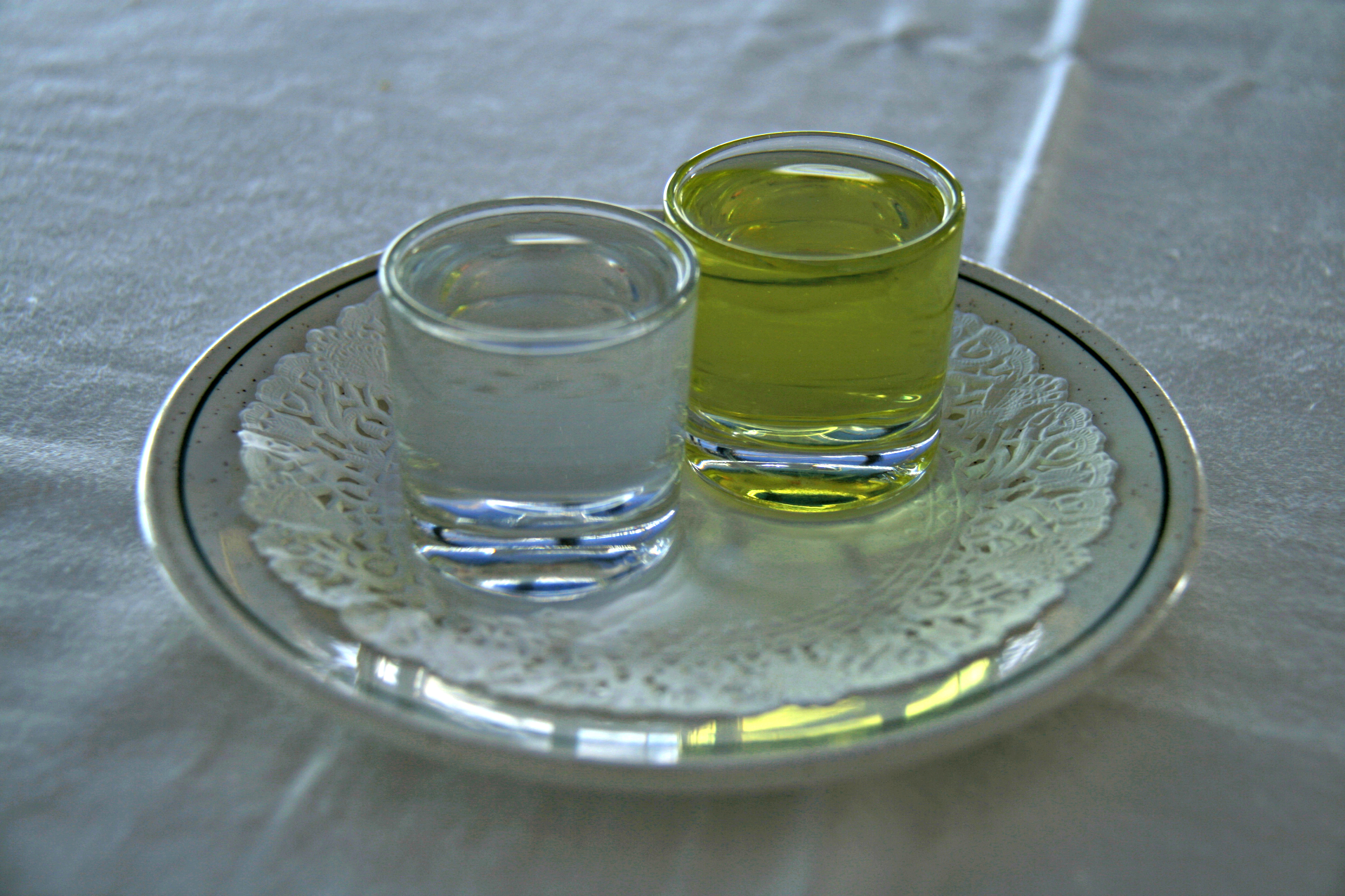 chupitos de aguardiente el amarillo es un "chupito de hierbas", el blanco es un chupito de aguardiente puro